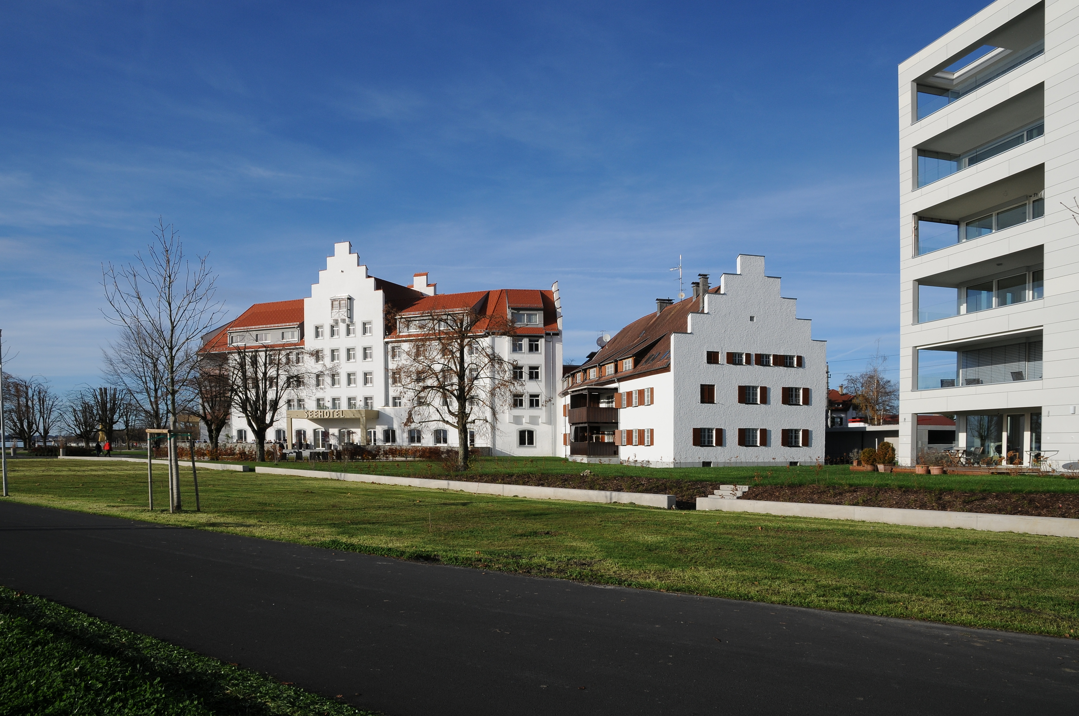 "Seehotel am Kaiserstrand" in Lochau am Bodensee. 1910 wurde das von Otto Mallaun geplante Gebäude eröffnet und 1912 erfolgte eine Erweiterung durch den Architekten Willibald Braun. 1954 wurde das Gebäude durch das Bundesheer als „Rhombergkaserne“ übernommen.